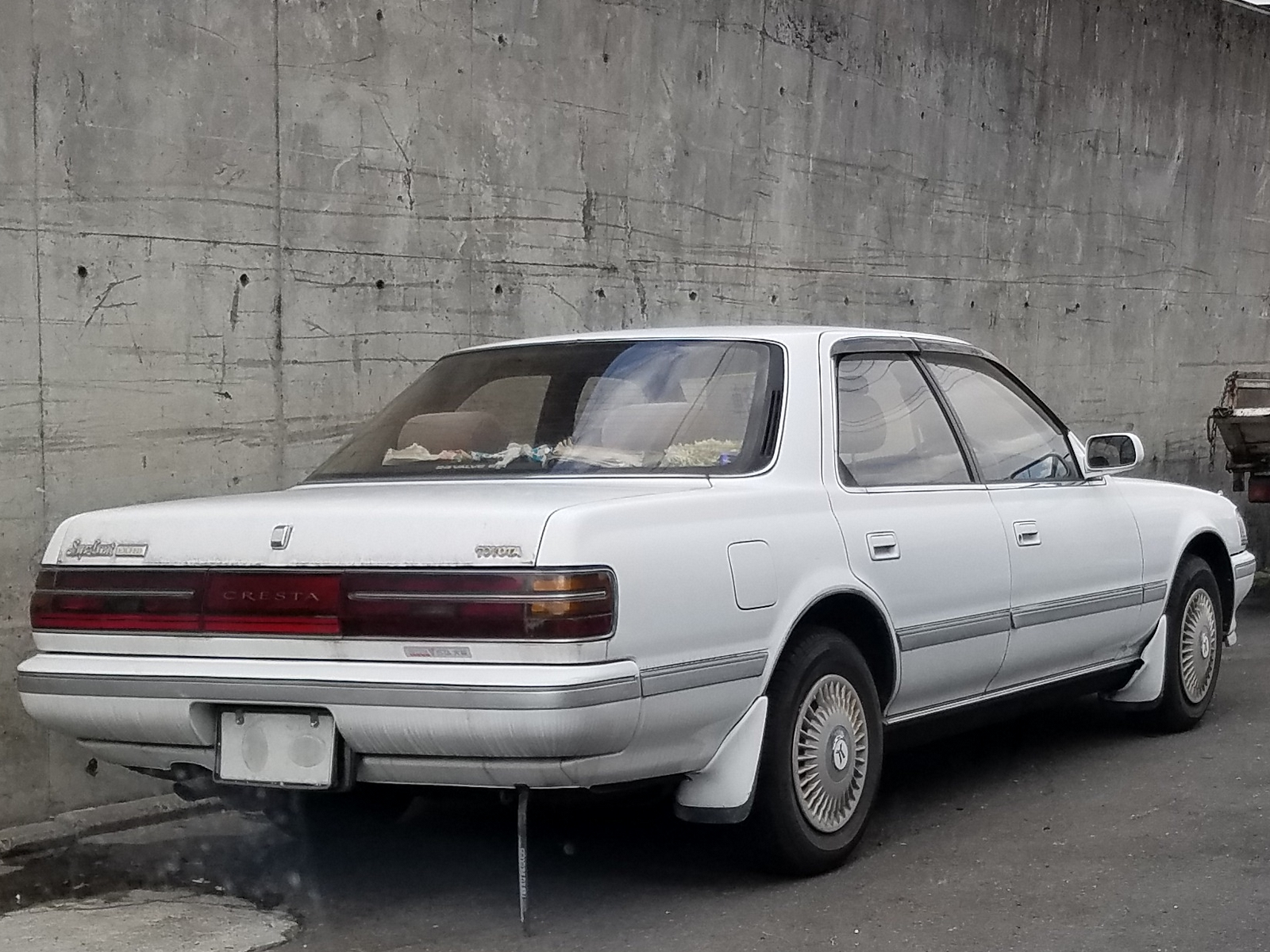 クレスタ スーパールーセントエクシード（前期型）